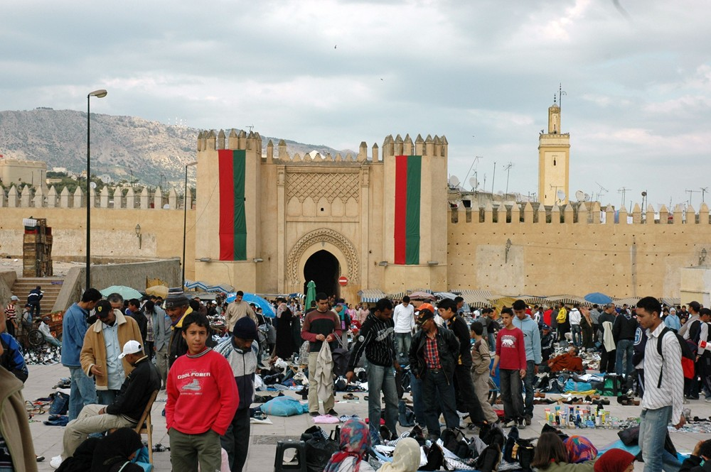 Fes - Bab Chorfa